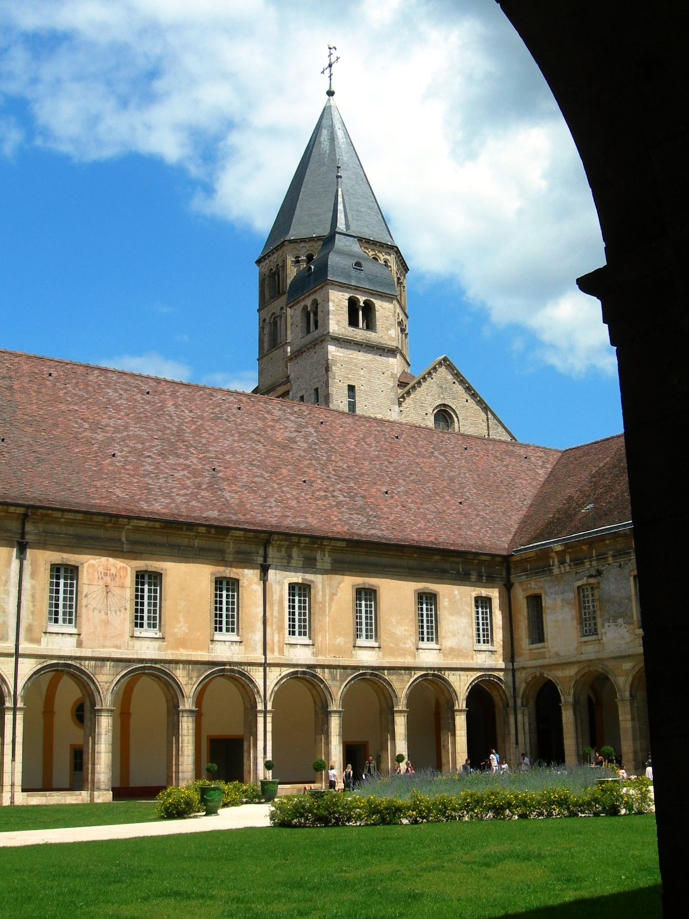 Cluny, la cour du monastere vers NE)